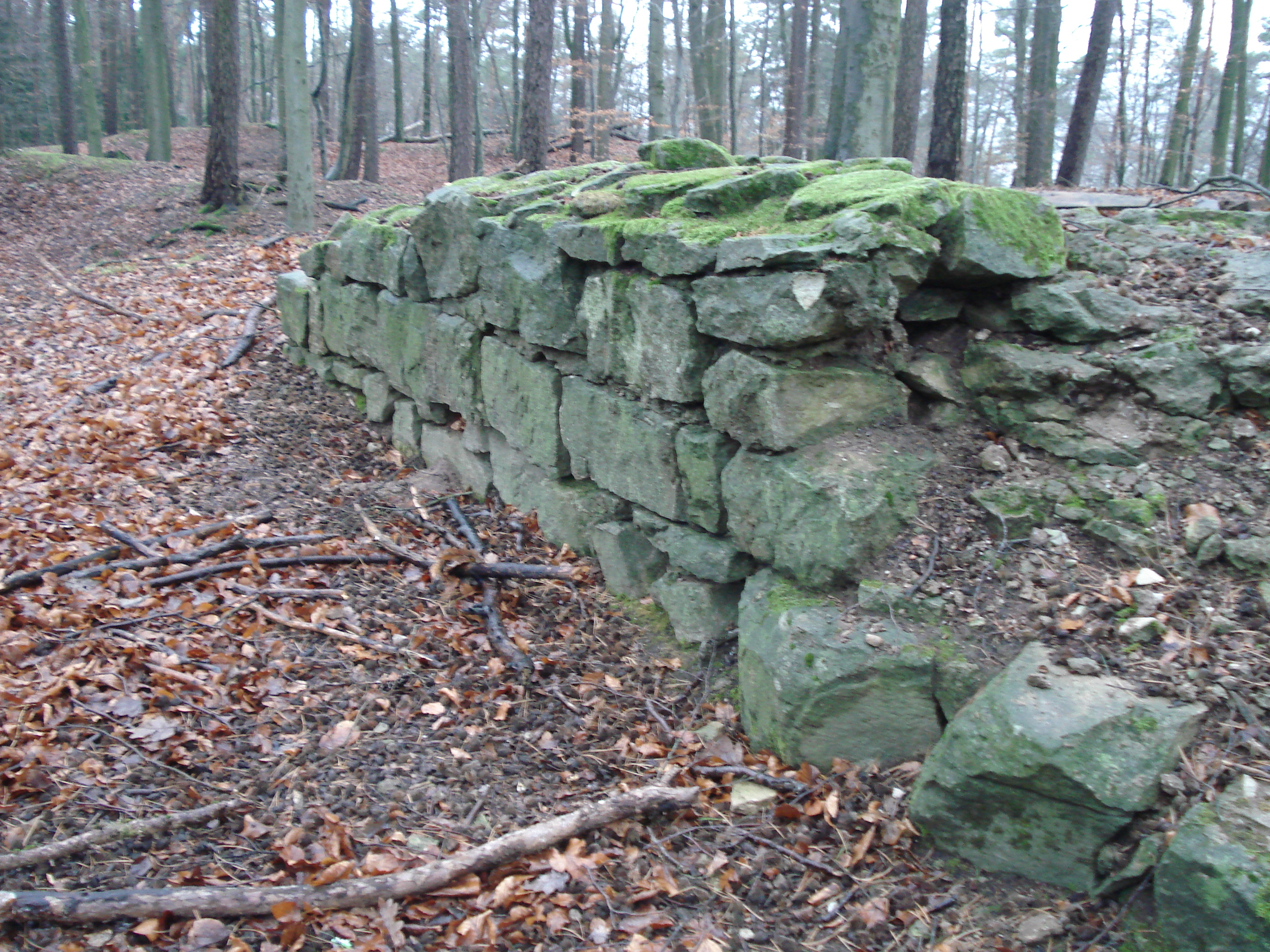 Mauerreste eines eckigen Turmes auf dem Gipfel des Klosterberges, die sich bei den Ausgrabungen des Archäologischen Spessartprojektes 2007 und 2013 als Fälschung des 19. Jahrhunderts herausstellte.